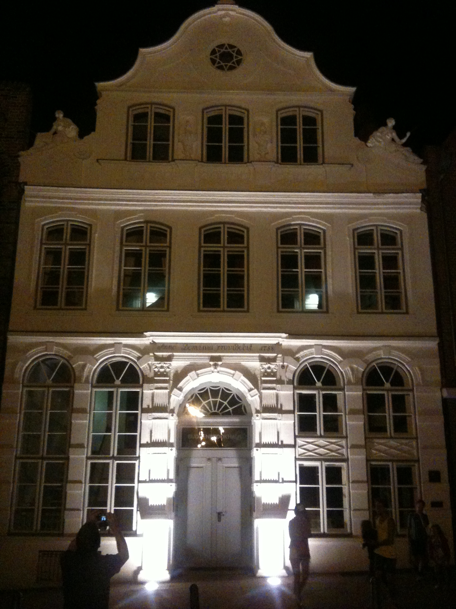 Buddenbrook House in Lubeck, Germany